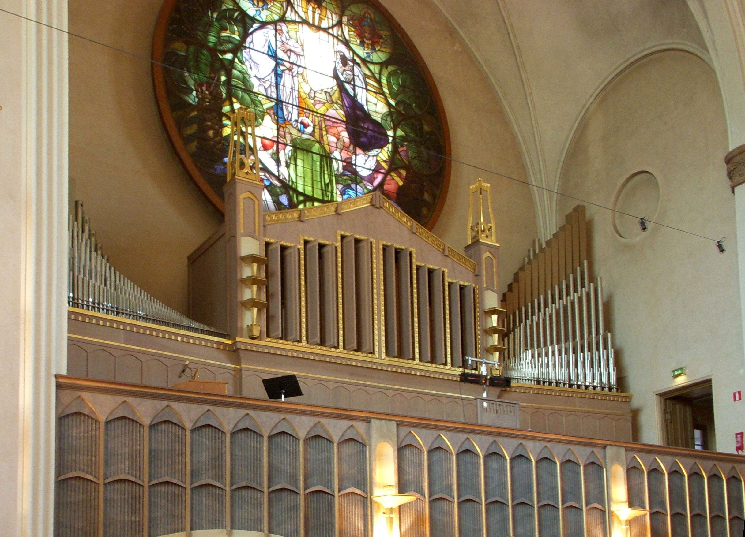 Sofia kyrka på Södermalm i Stockholm, interiör